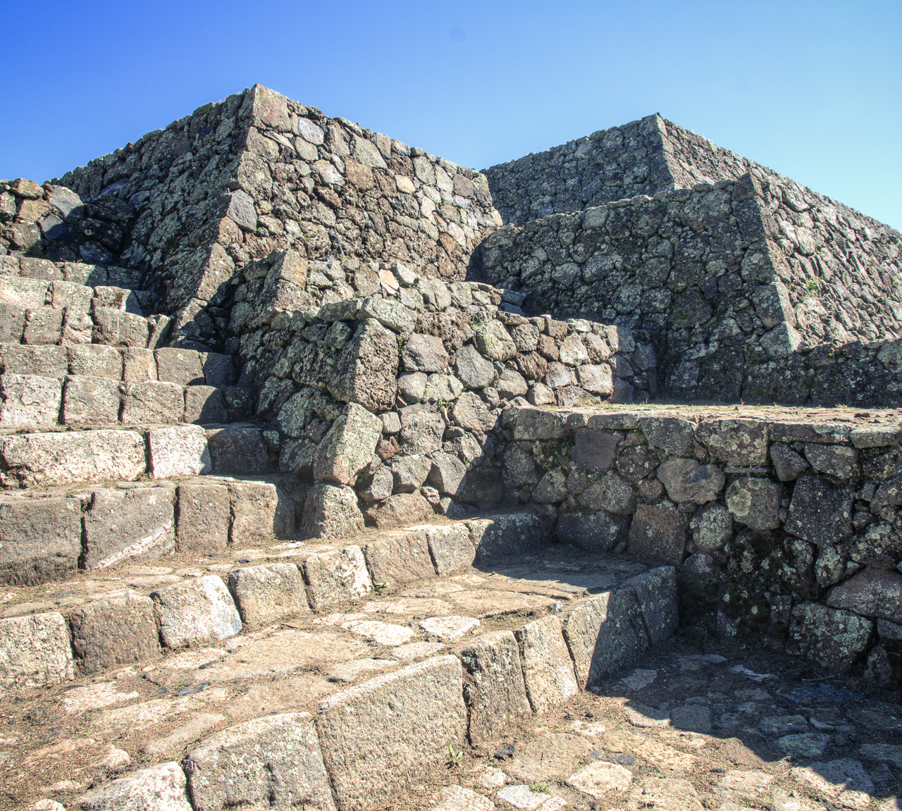 Cantona, la Casa del Sol — en Puebla.